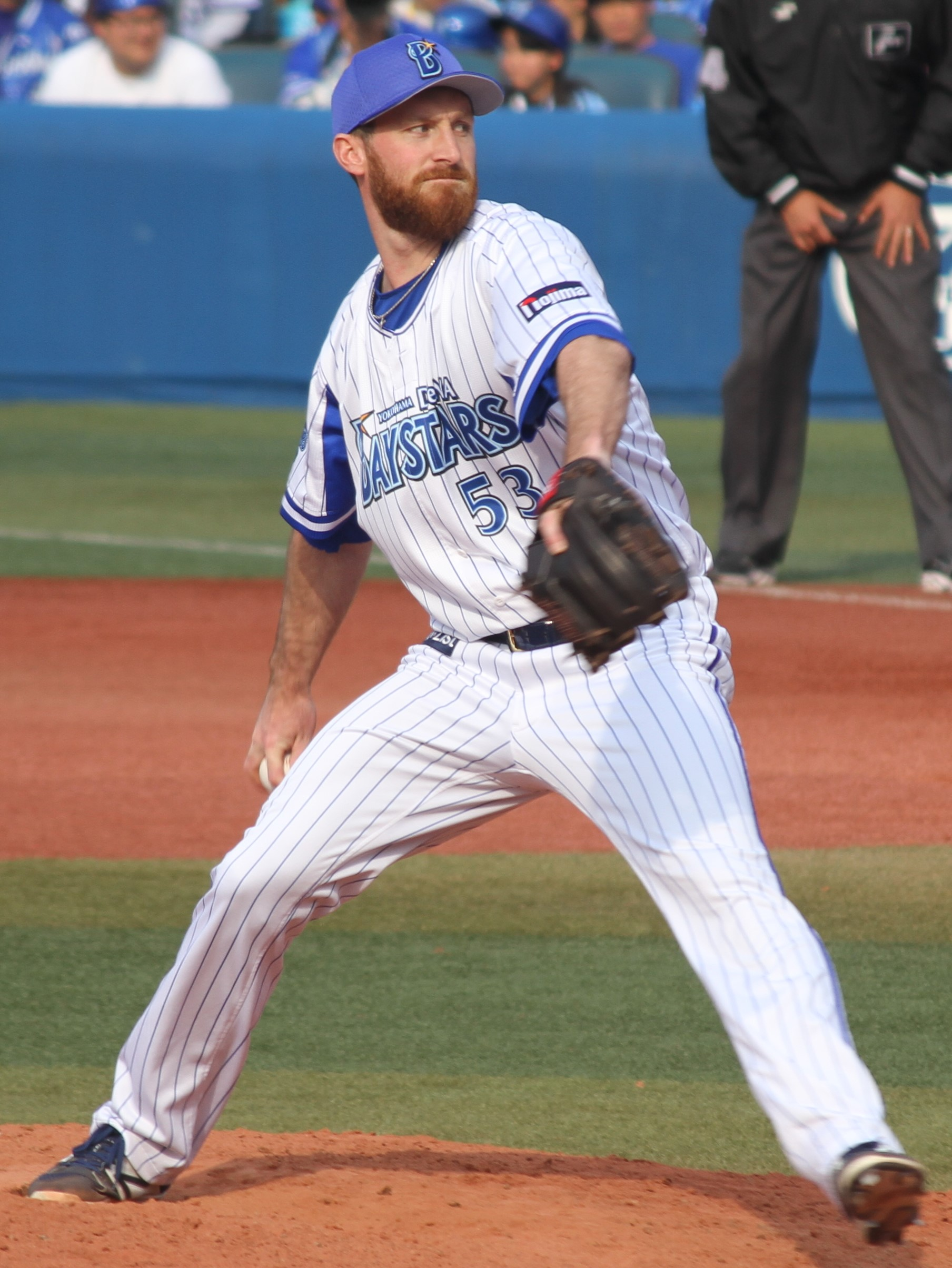 横浜DeNAベイスターズ投手のスペンサー・バーデット・パットン。横浜スタジアムにて。